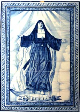 Azulejo con una imagen de santa Rafaela Porras